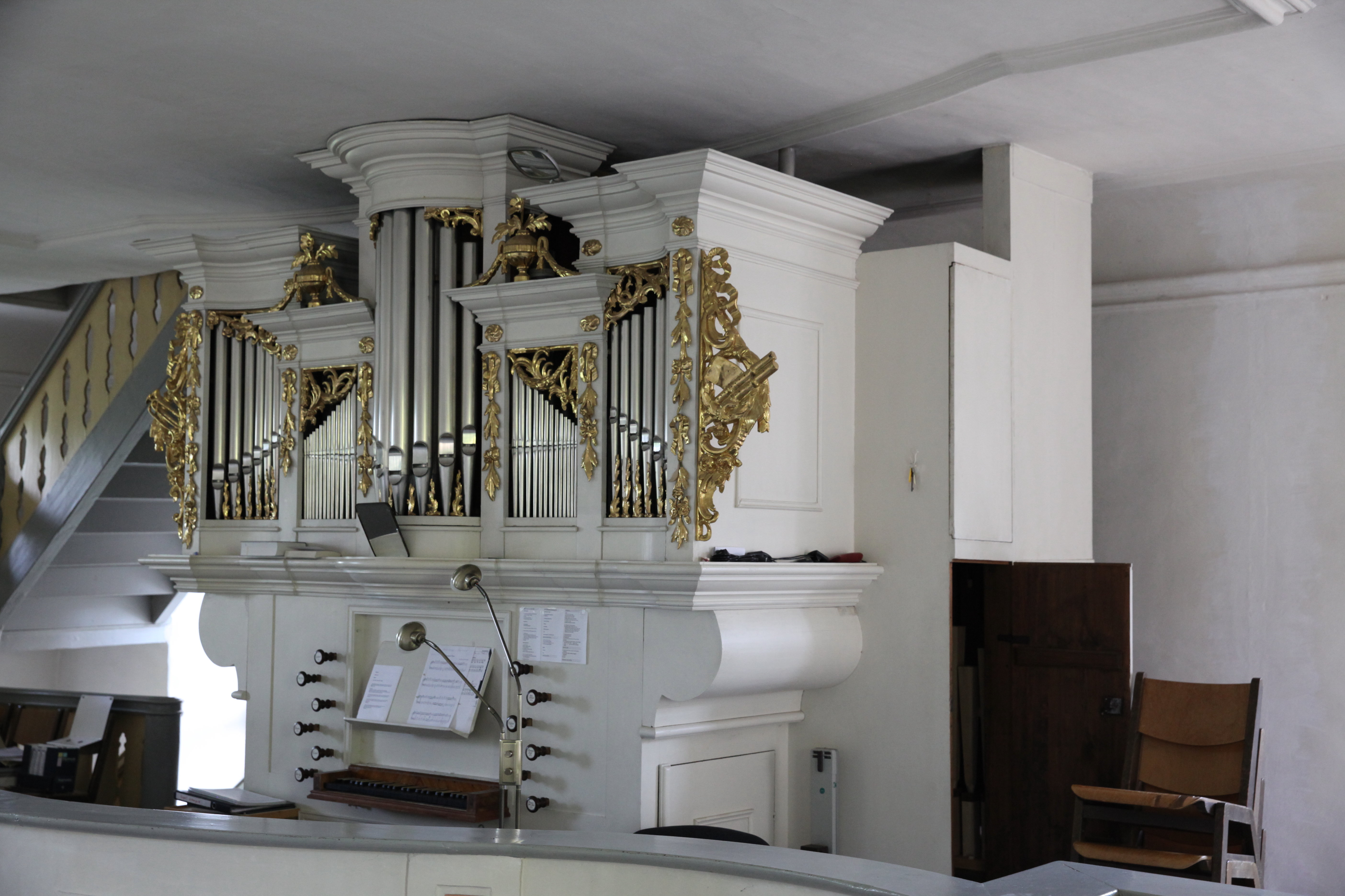 Orgel der Schlosskirche in Ahorn